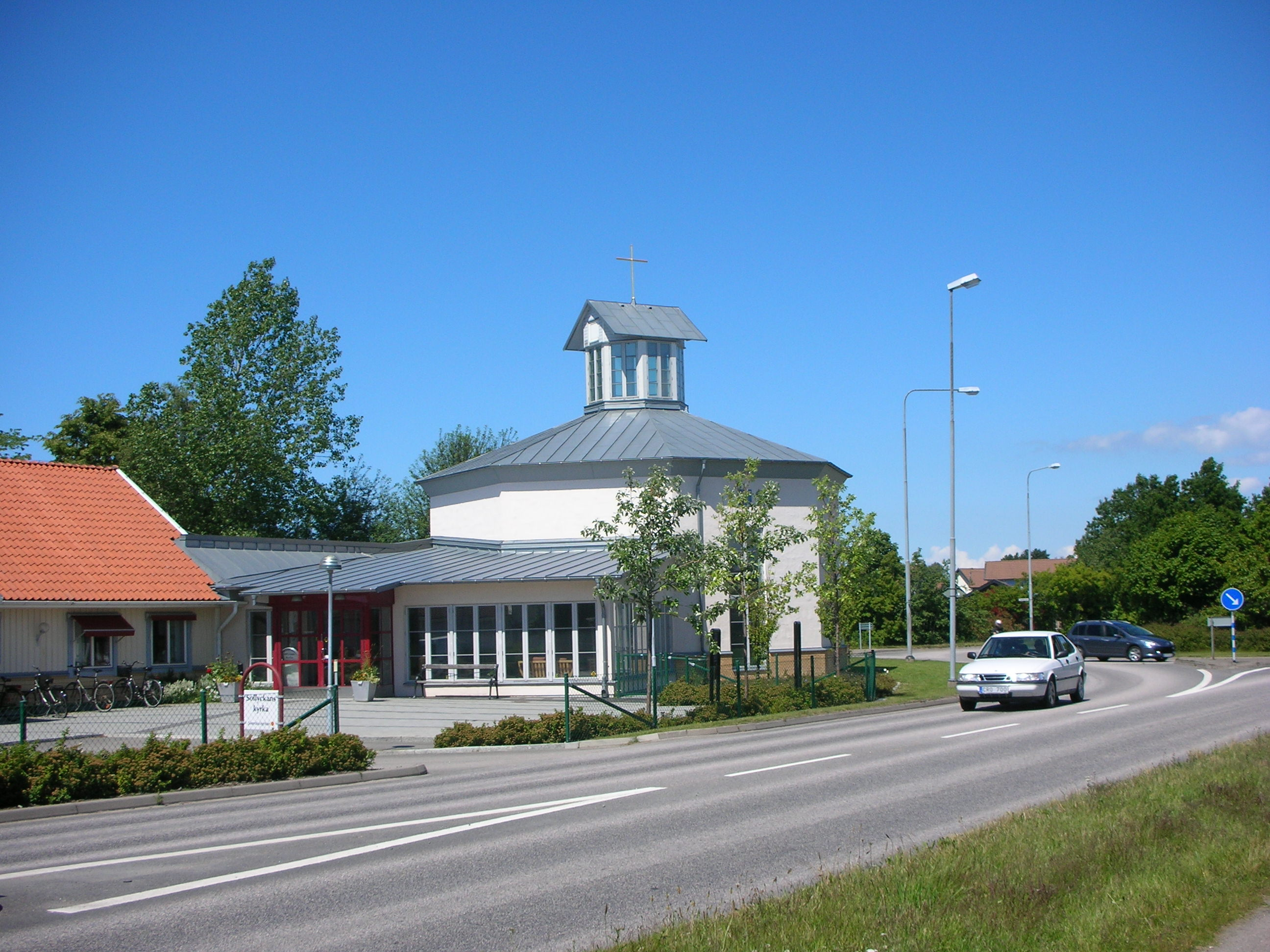 Sollyckans kyrka, Varbergs församling.